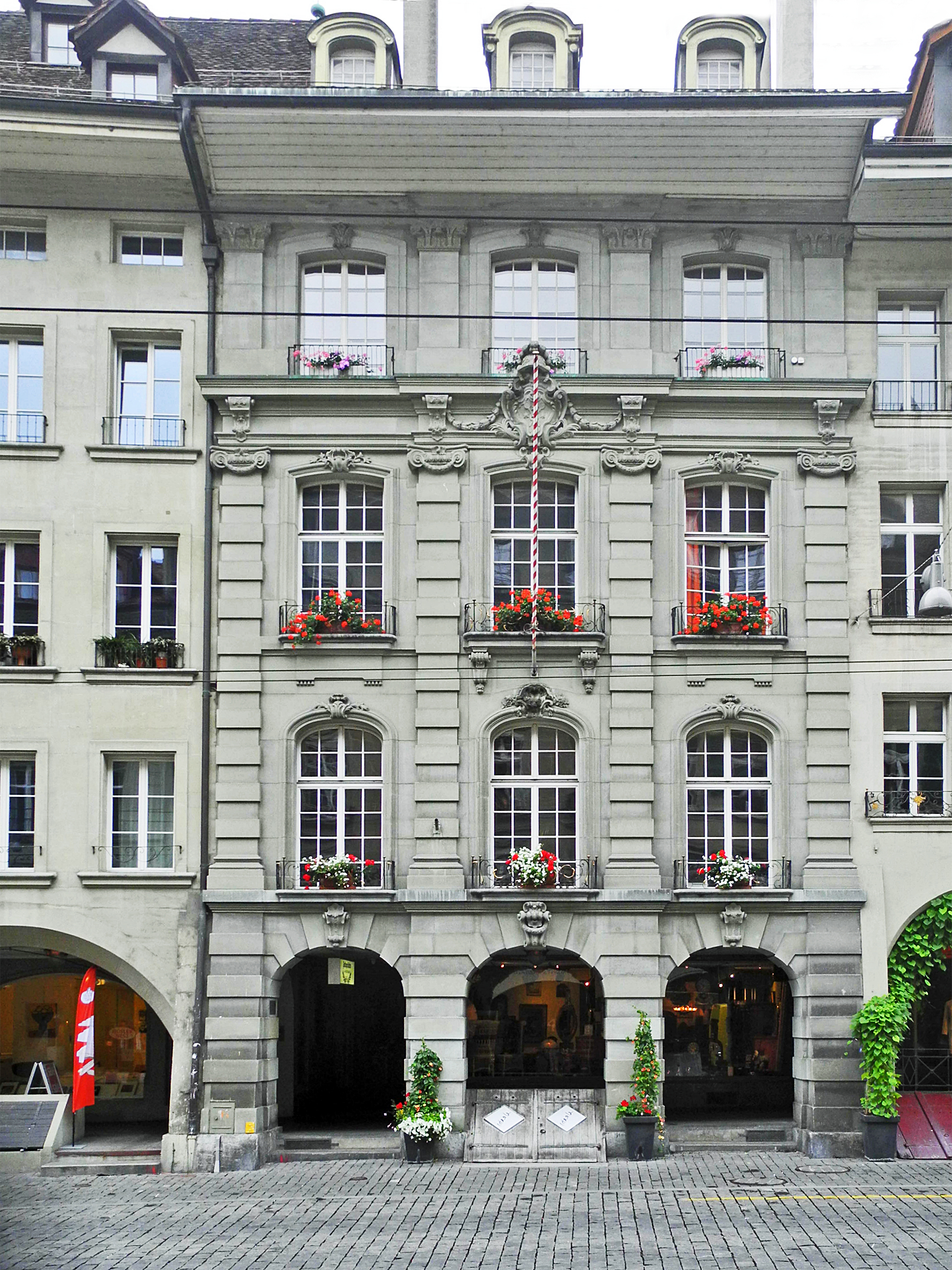 Zunfthaus der Gesellschaft zu Pfistern in Bern